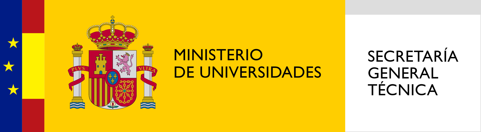 Logotipo de la Secretaría General Técnica del Ministerio de Universidades de España.